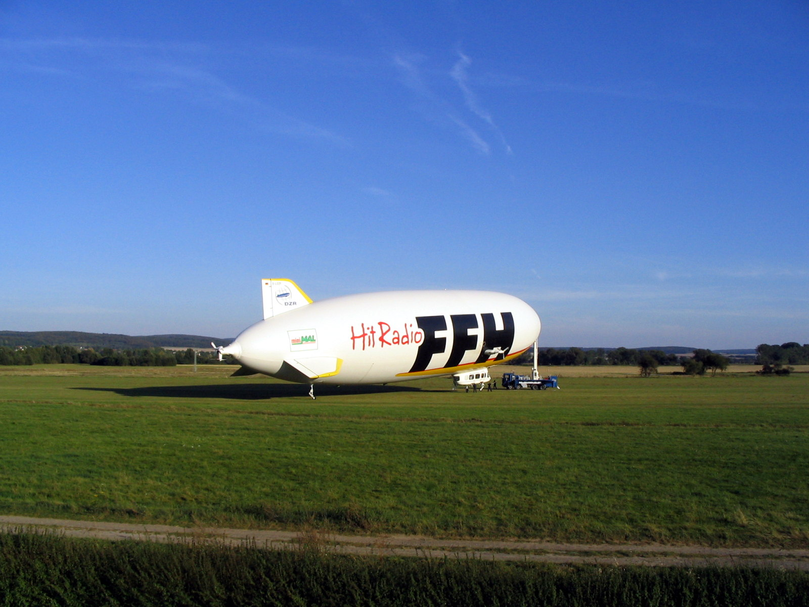 FFH Zeppelin am Ziegenhainer(Hessen) Flughafen